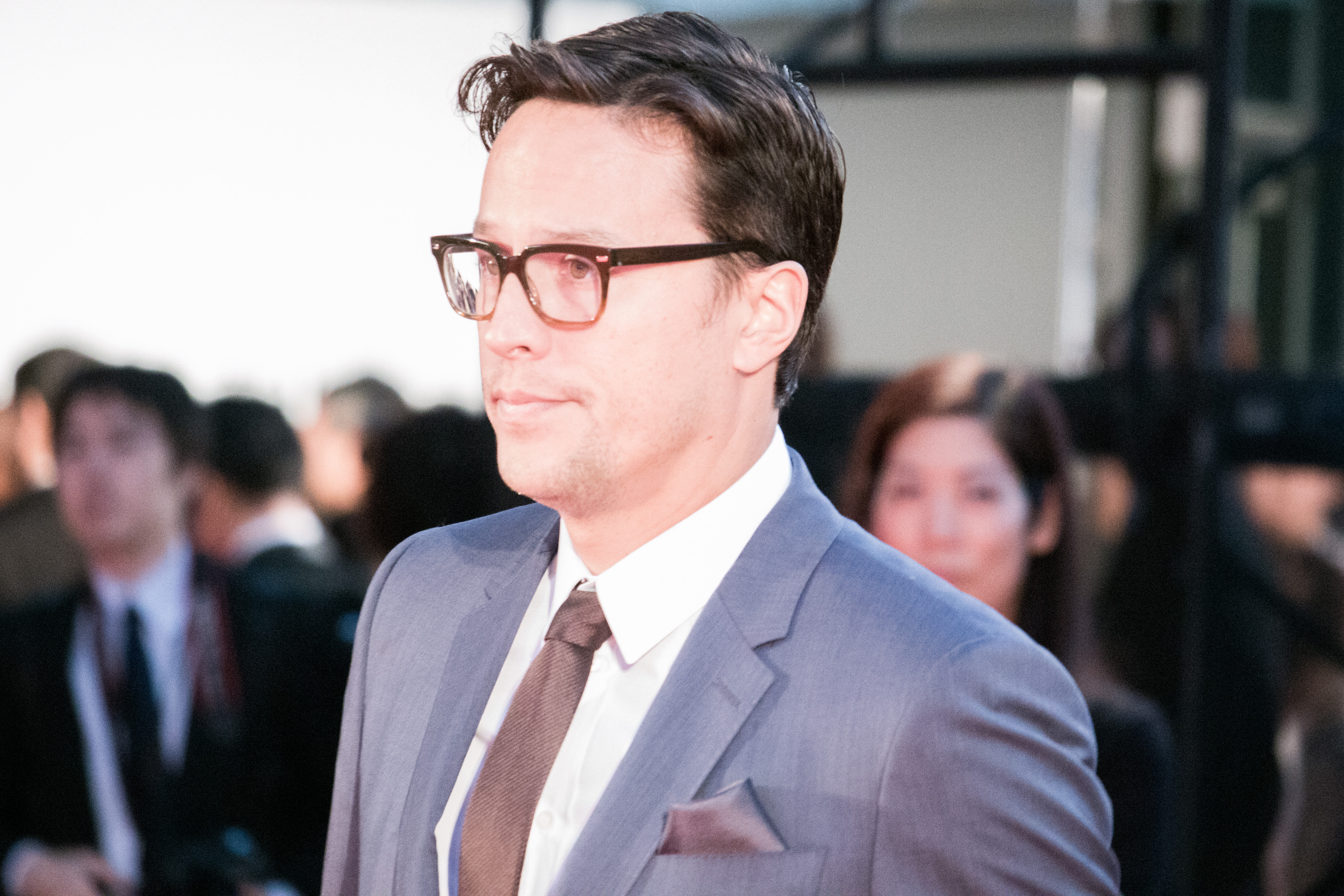 第28回 東京国際映画祭 オープニングセレモニー キャリー・ジョージ・フクナガ (ビースト・オブ・ノー・ネーション)